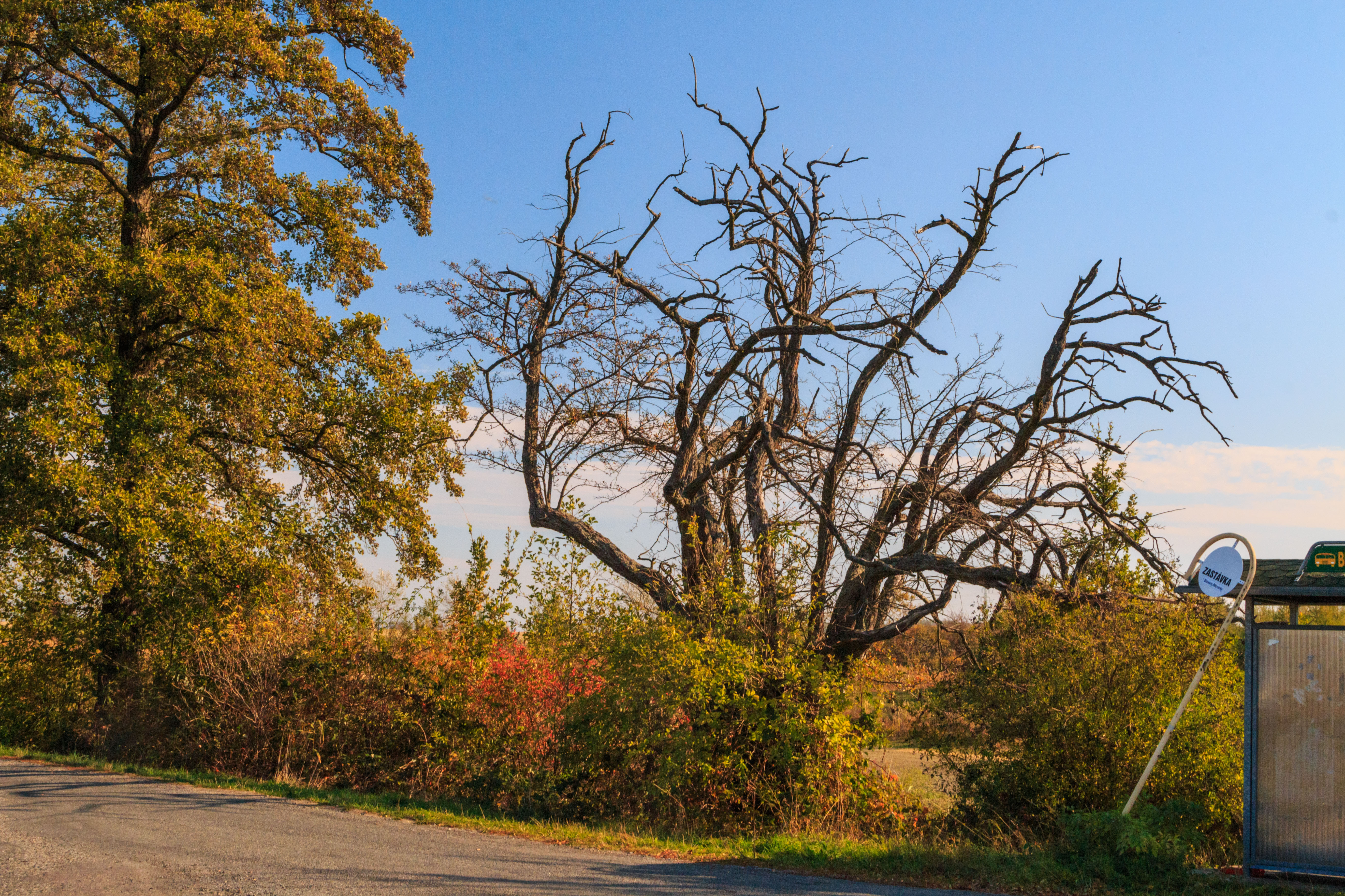 Hloh u Bítovánek Project: Vodstvo Ticket: 1617.